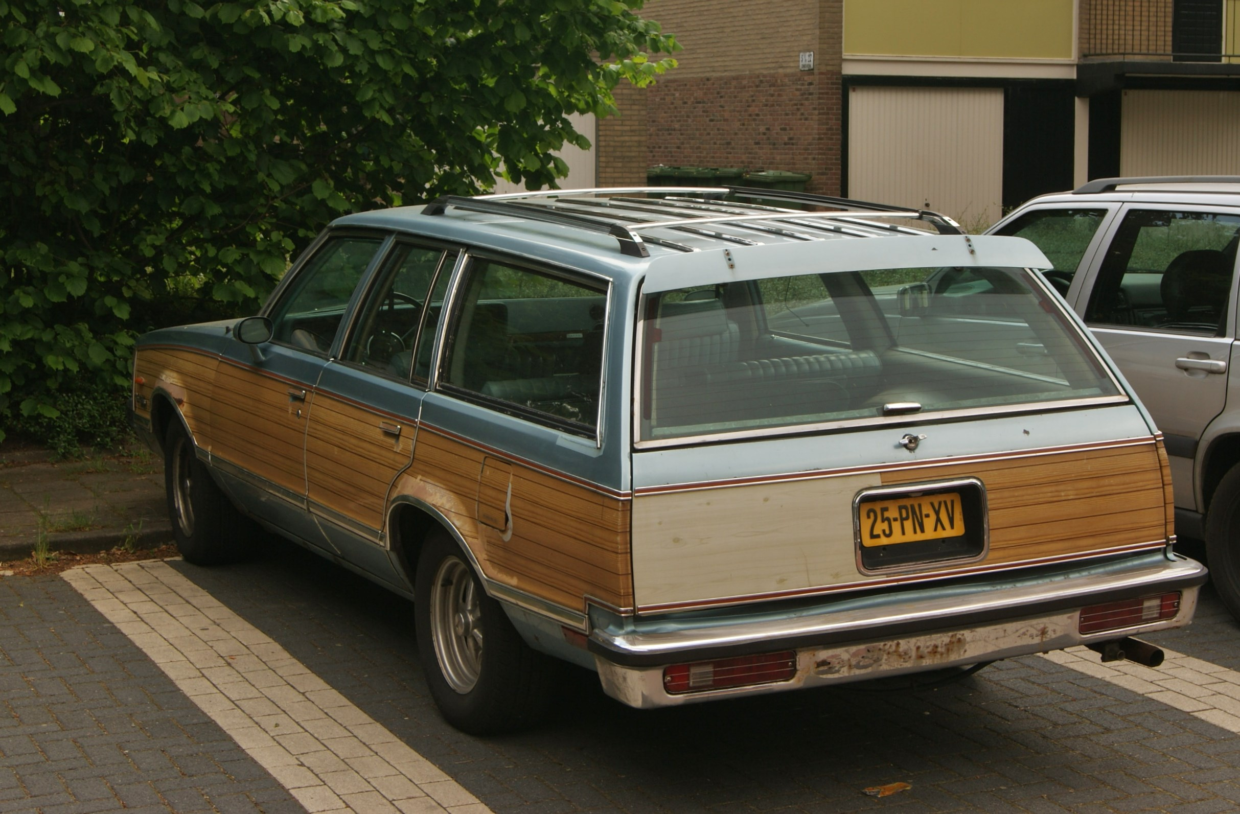 25-PN-XV